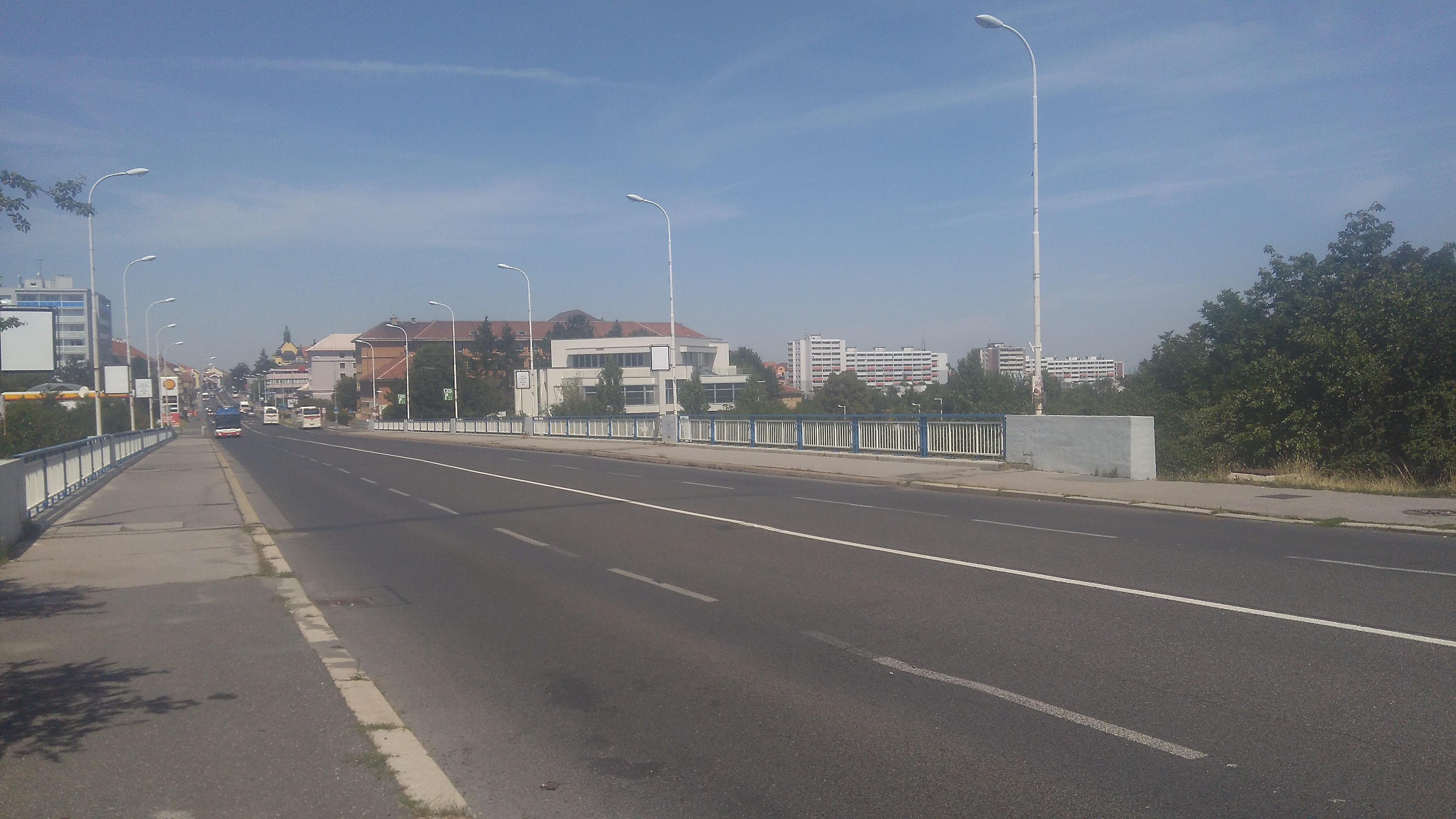 Sítenský most od hotelu Kladno do centra